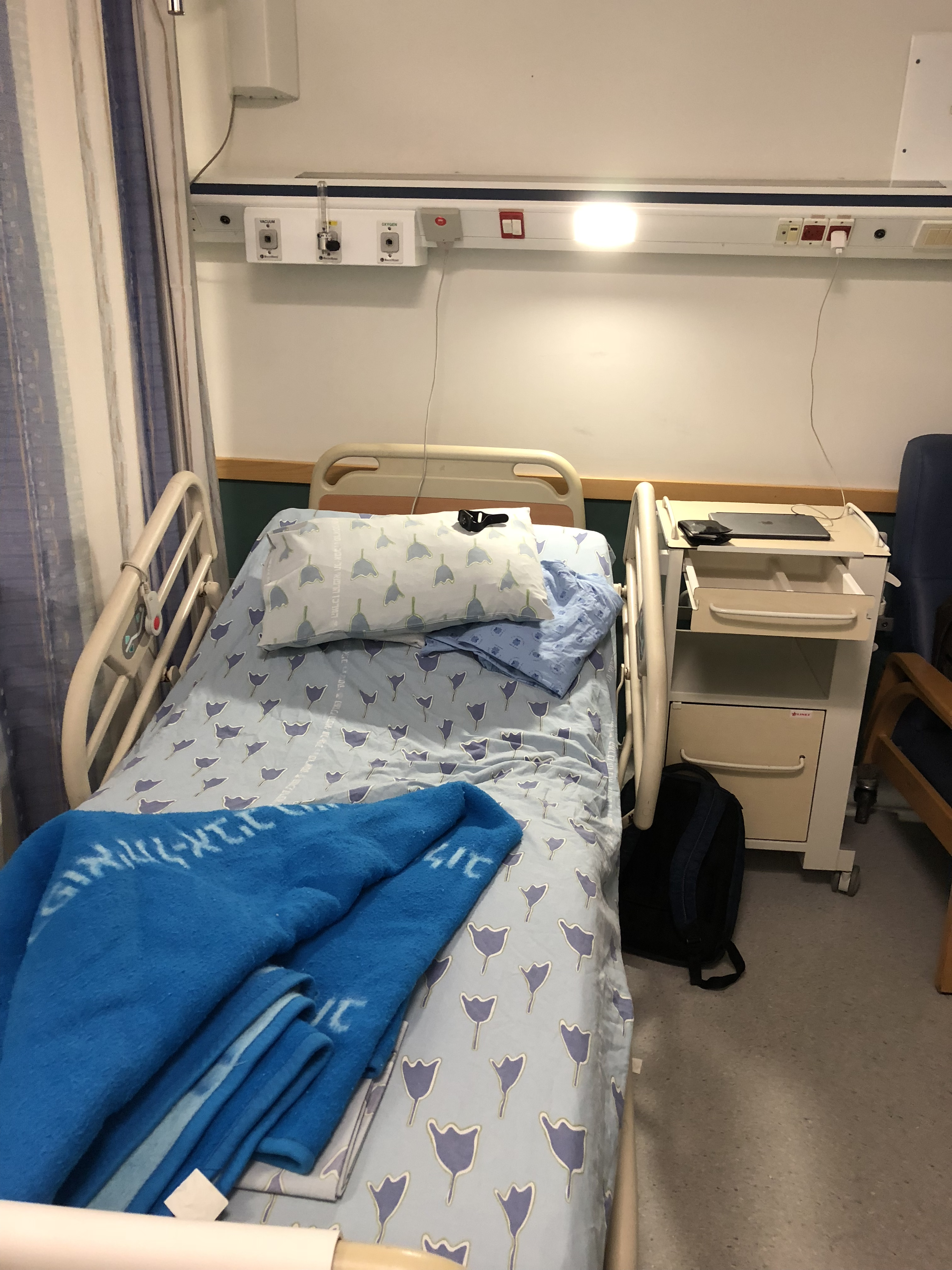 מיטת אשפוז בבית החולים איכילוב, 2017